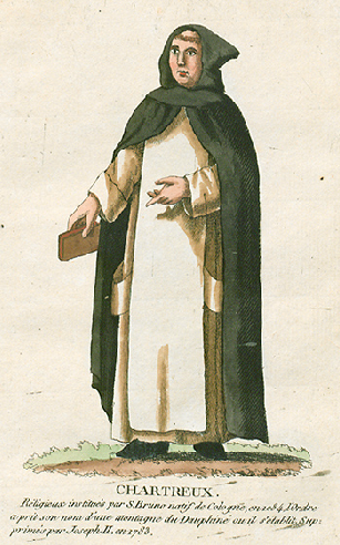 Collection de costumes de tous les ordres monastiques, supprimés à differentes époques, dans la ci-devant Belgique, Bruxelles, Philippe Joseph Maillart et sœur, 1811